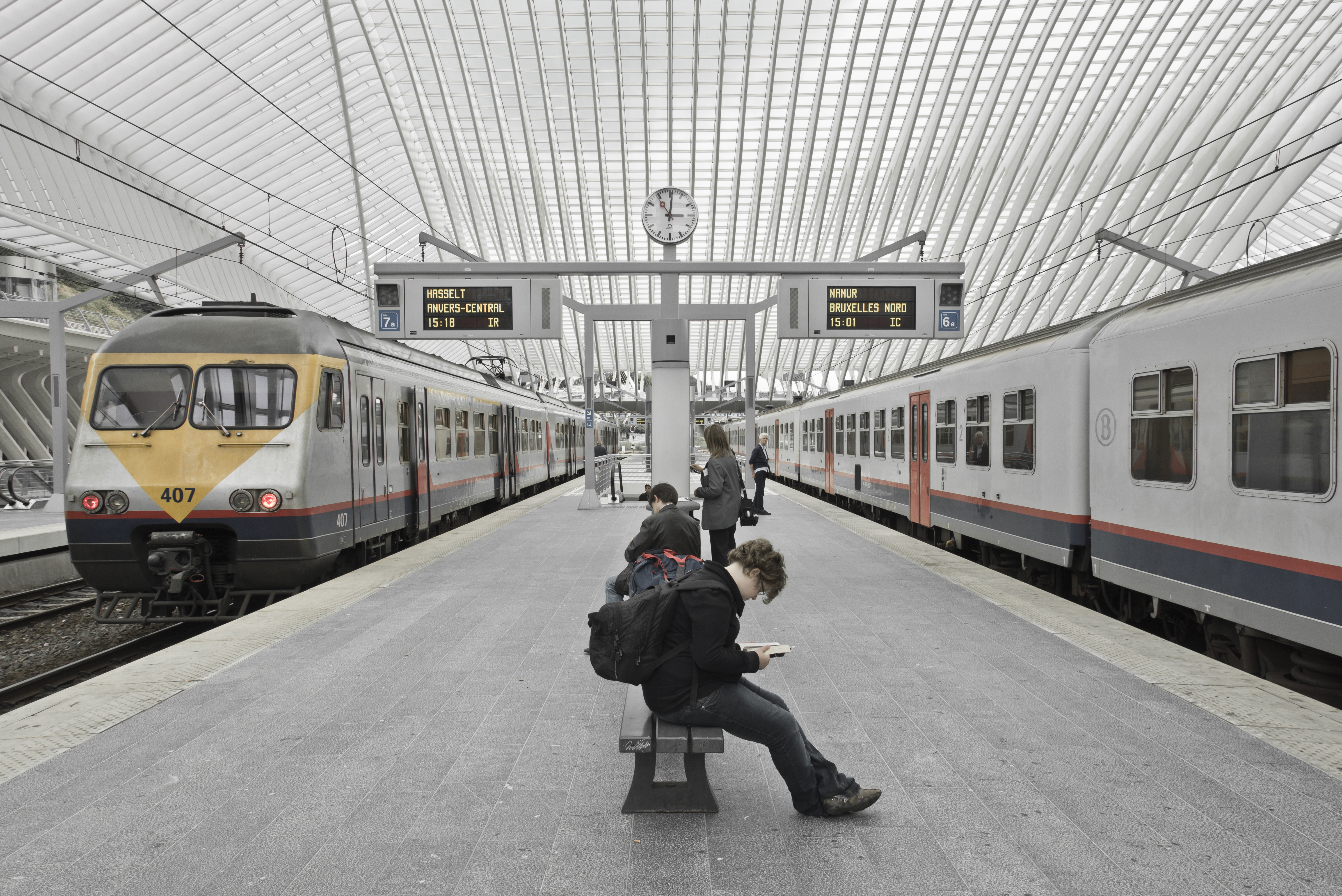 Gare Liège-Guillemins - Liège - Belgique / Belgium